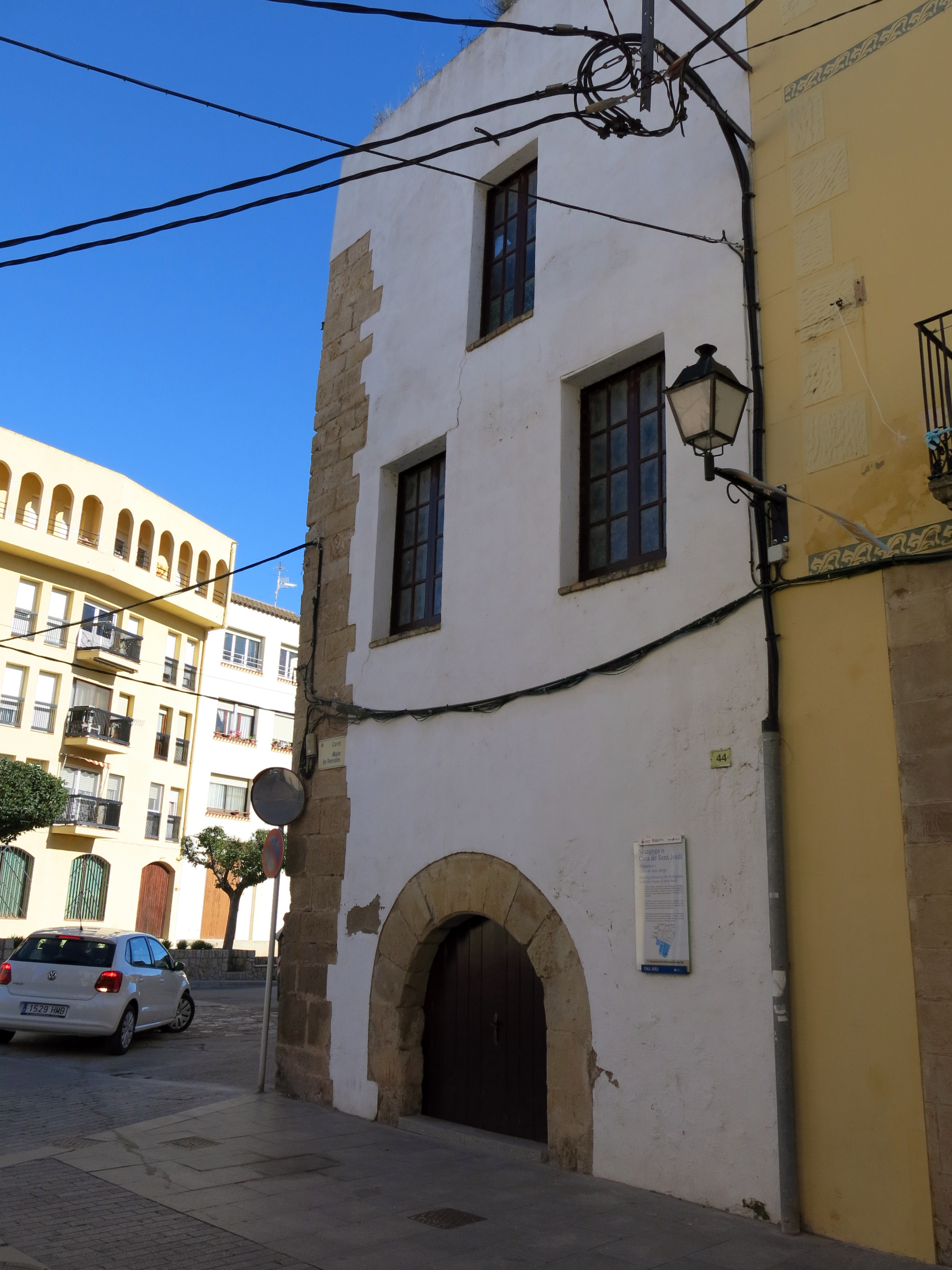 Antiga sinagoga jueva (Tortosa)